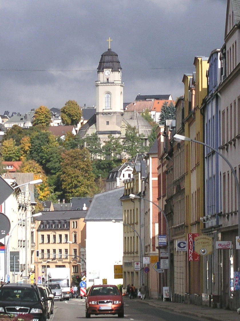 Friedenskirche